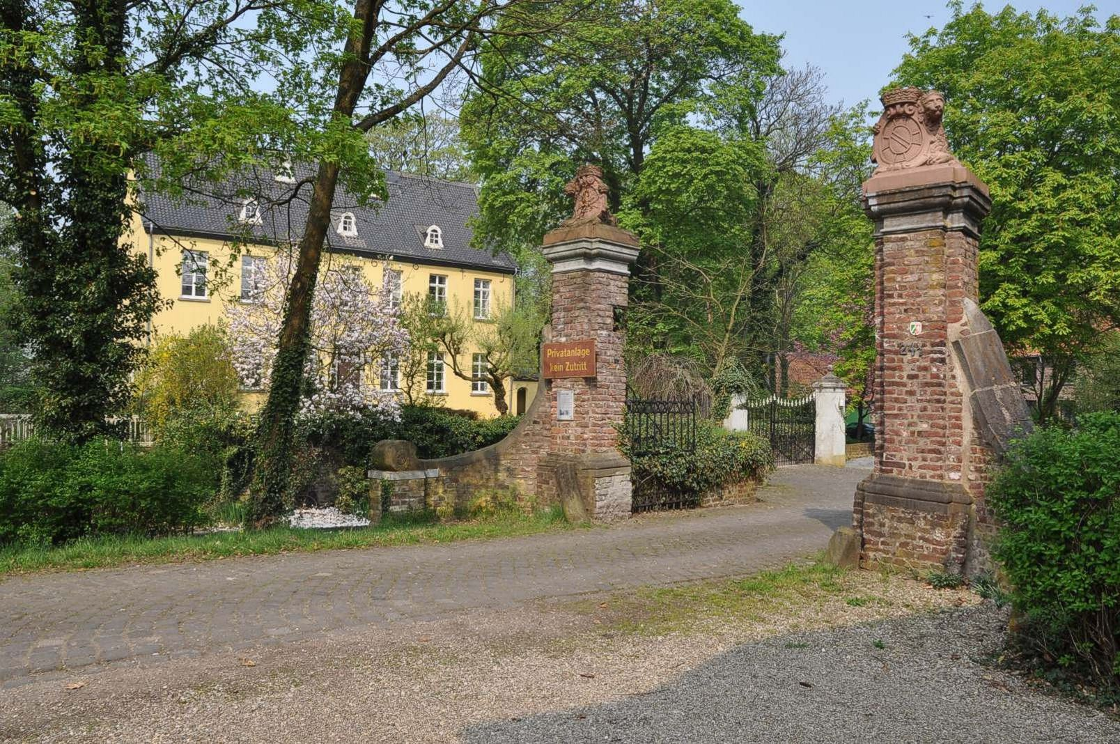 Toranlage und Herrenhaus von "Haus Traar" in Krefeld, Nordrhein-Westfalen, Deutschland.